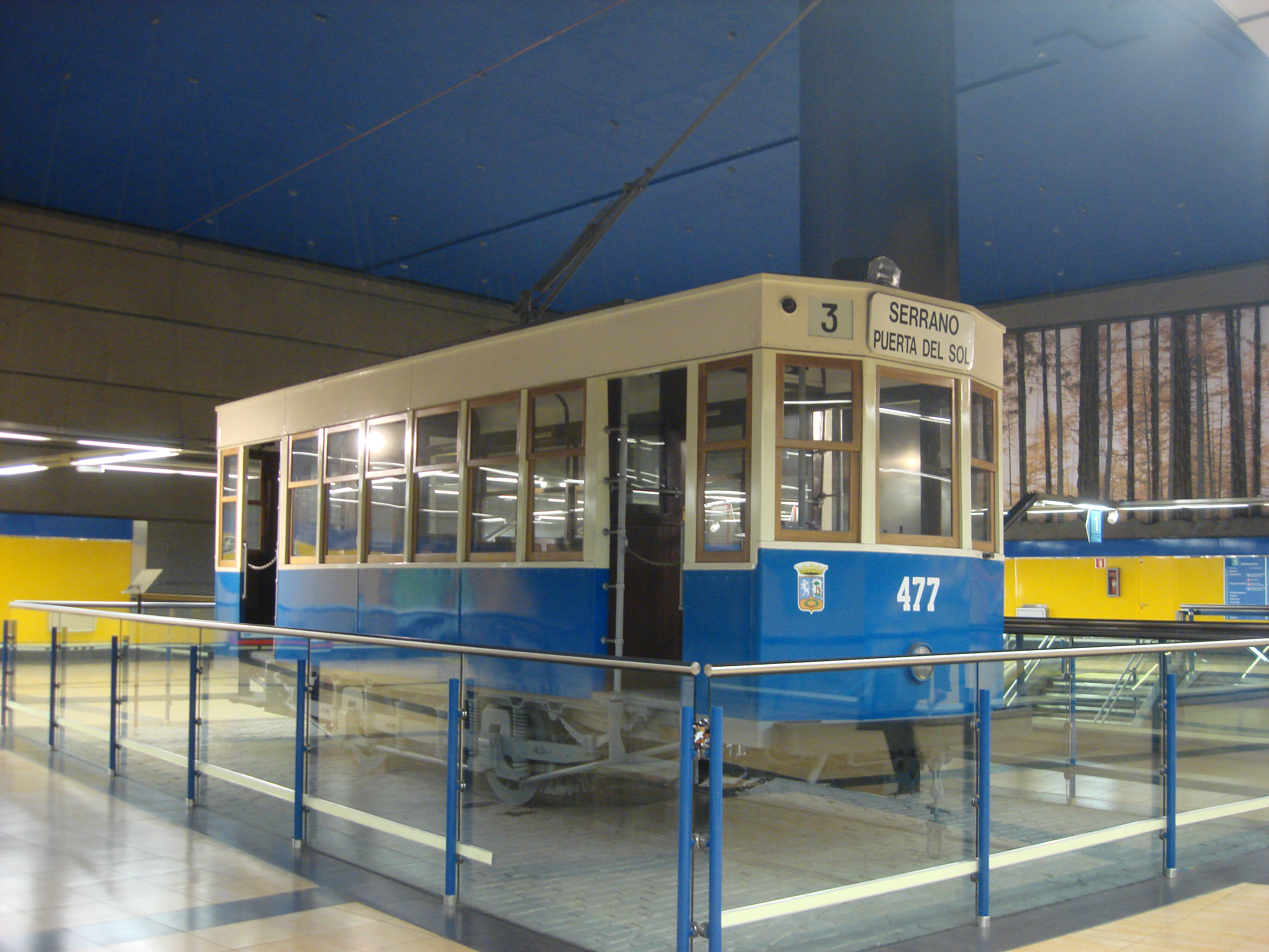 Own work